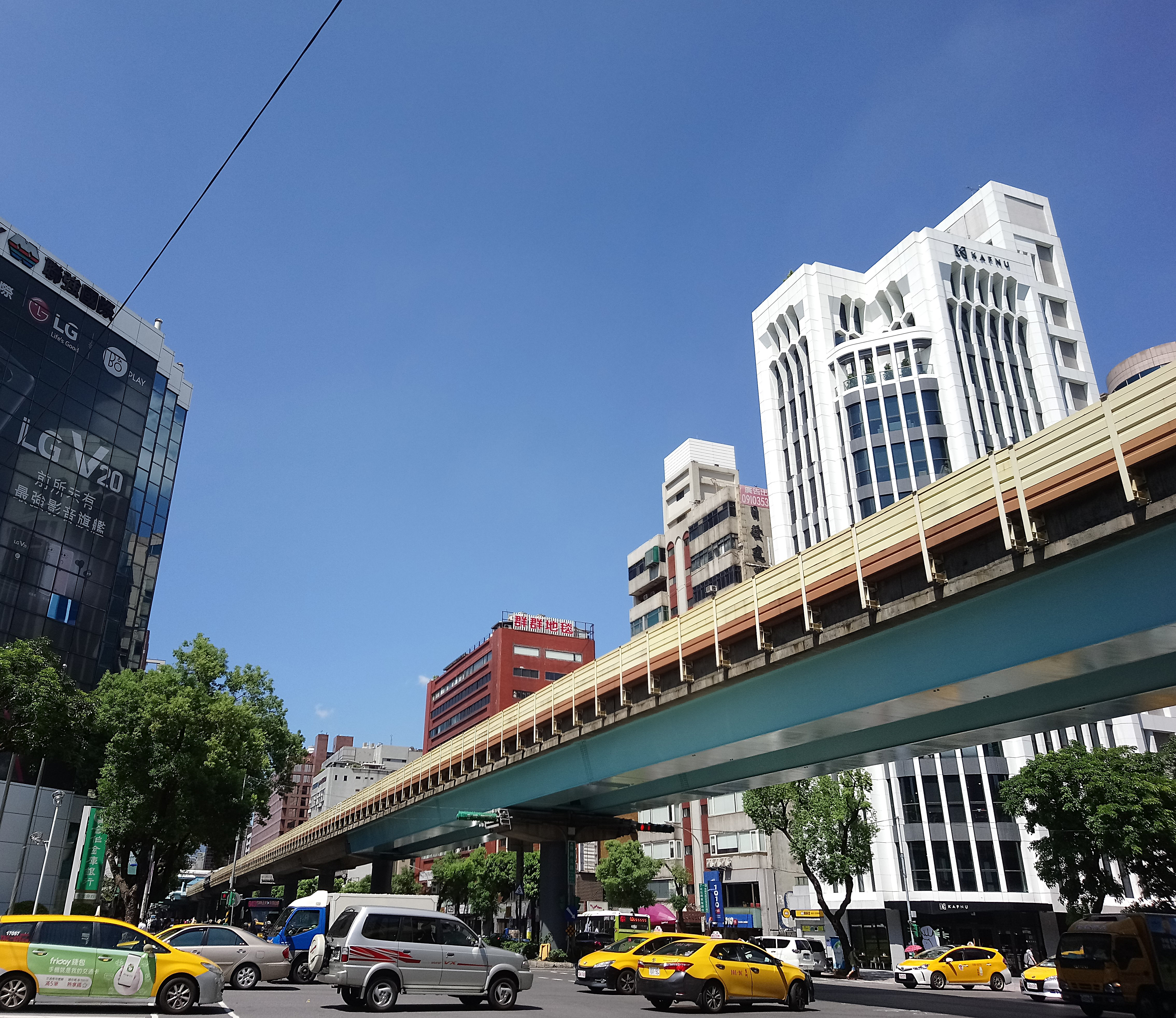 臺北捷運文山線民生東路三段與復興北路口高架橋,臺北市中山區長春次分區龍洲里